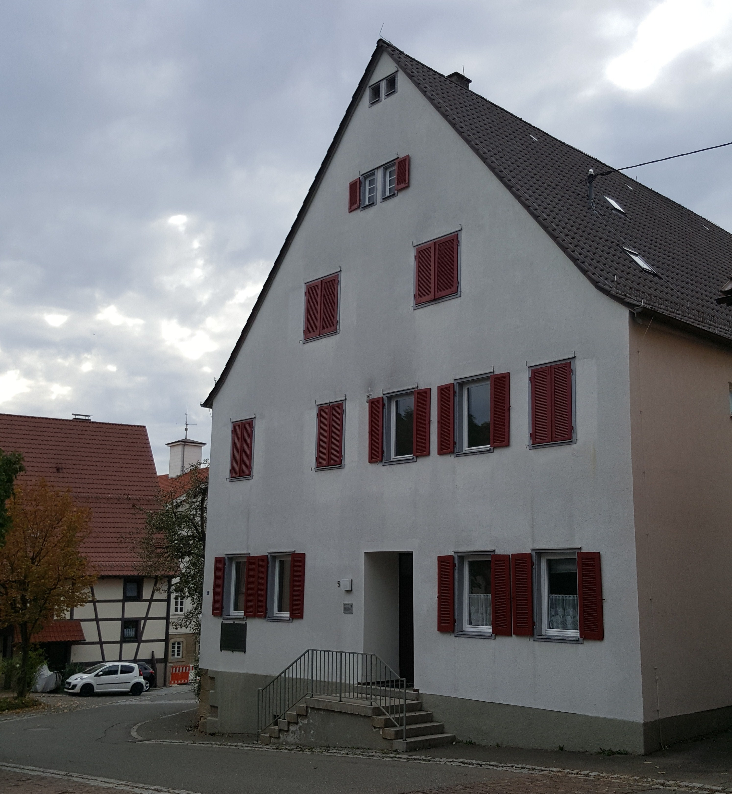 Walddorfhäslach Walddorf Pfarrhaus Gustav-Werner-Straße